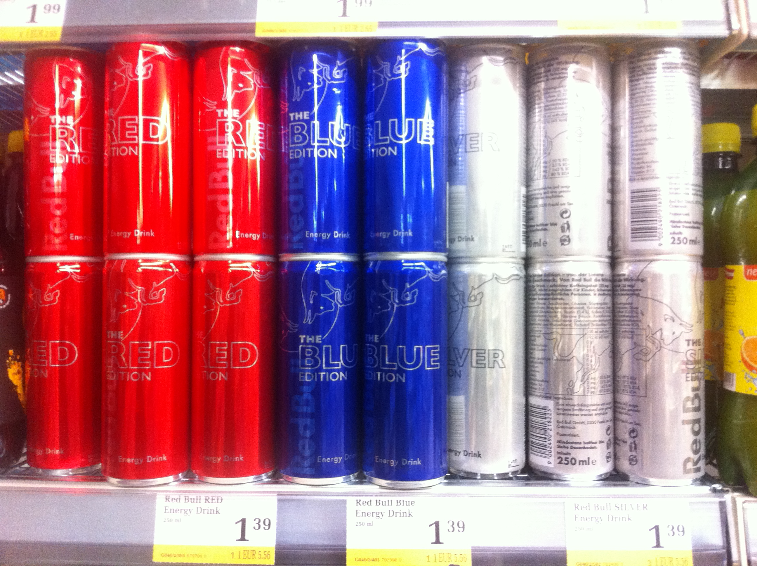 Foto der Red Bull Special Editions in einem österreichischen Supermarkt